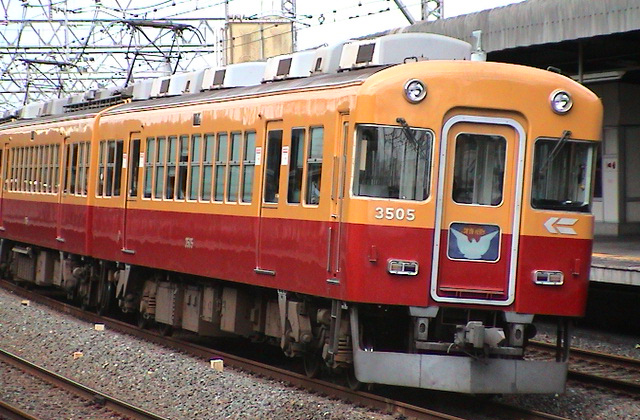 京阪3000系電車（初代）3505